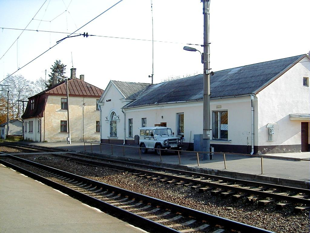 Железнодорожная станция Олайне.